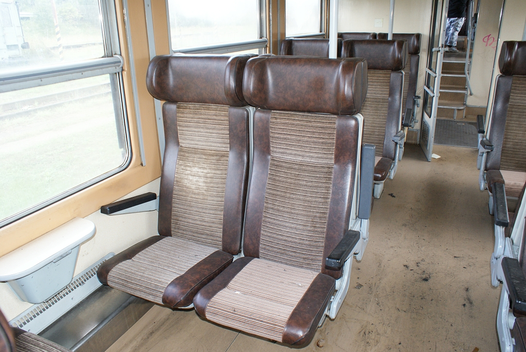 Interier elektrické jednotky 470 003